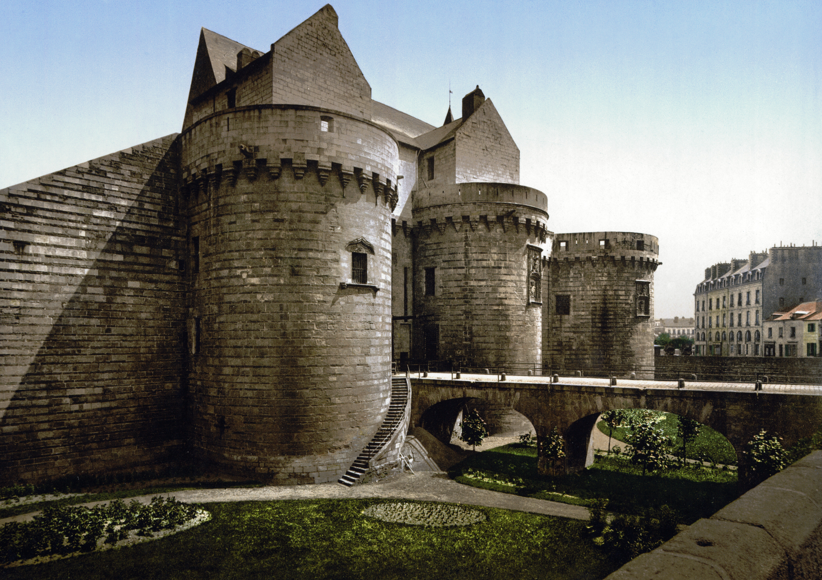 Château des Ducs de Bretagne in Nantes, entrance